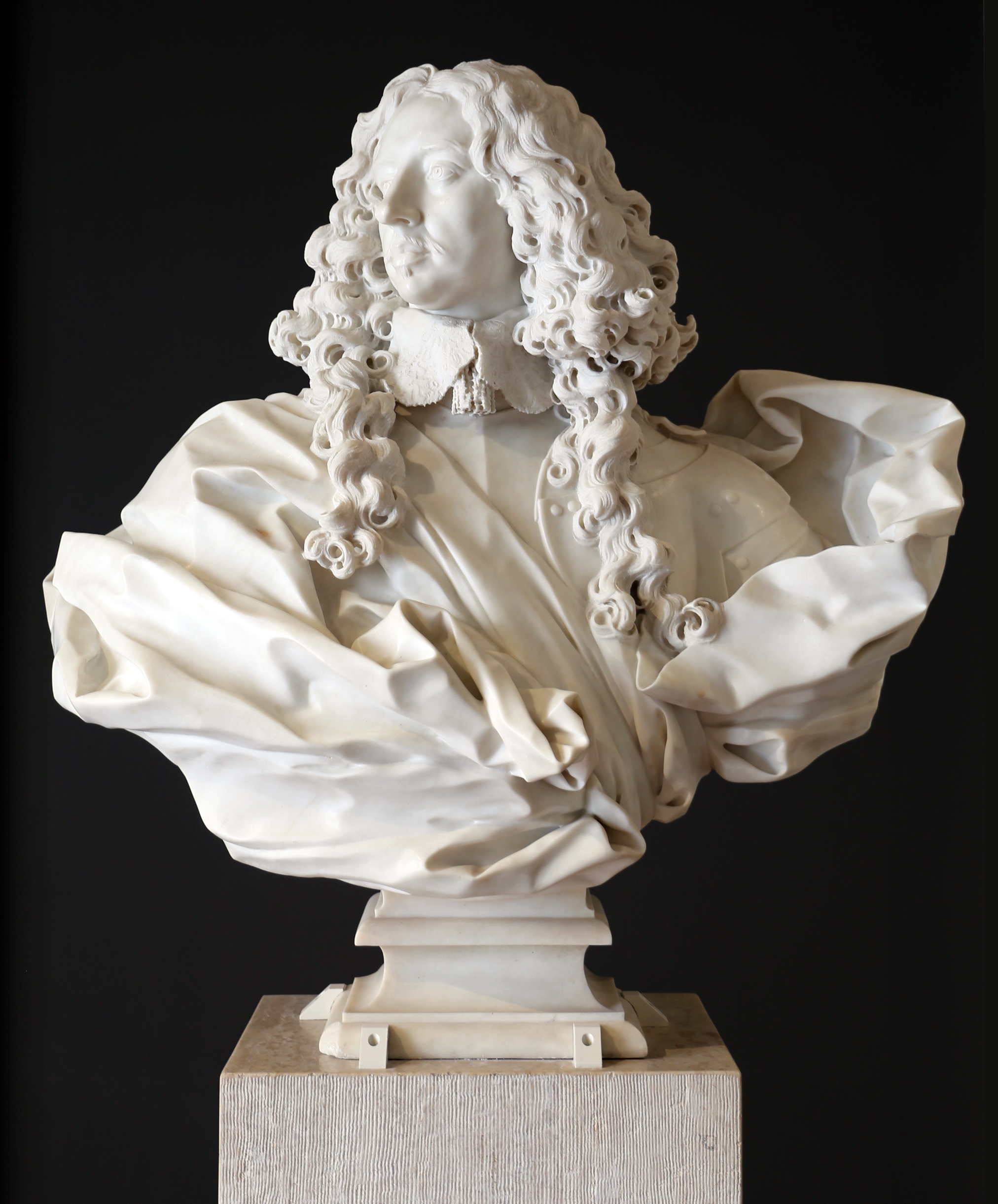 Palazzo dei Musei (Modena) This is a photo of a monument which is part of cultural heritage of Italy.